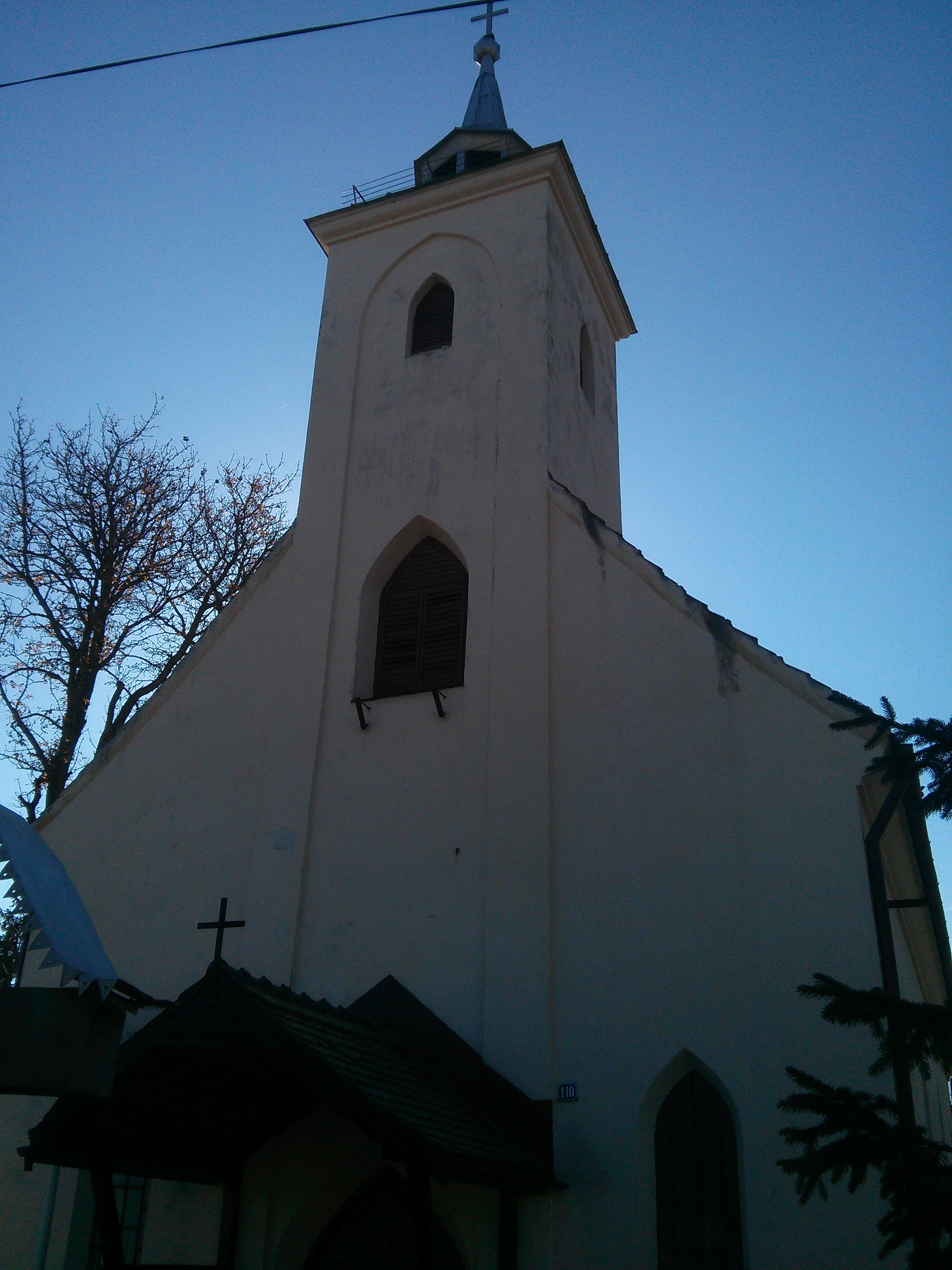 Biserica „Sf. Nicolae” 01